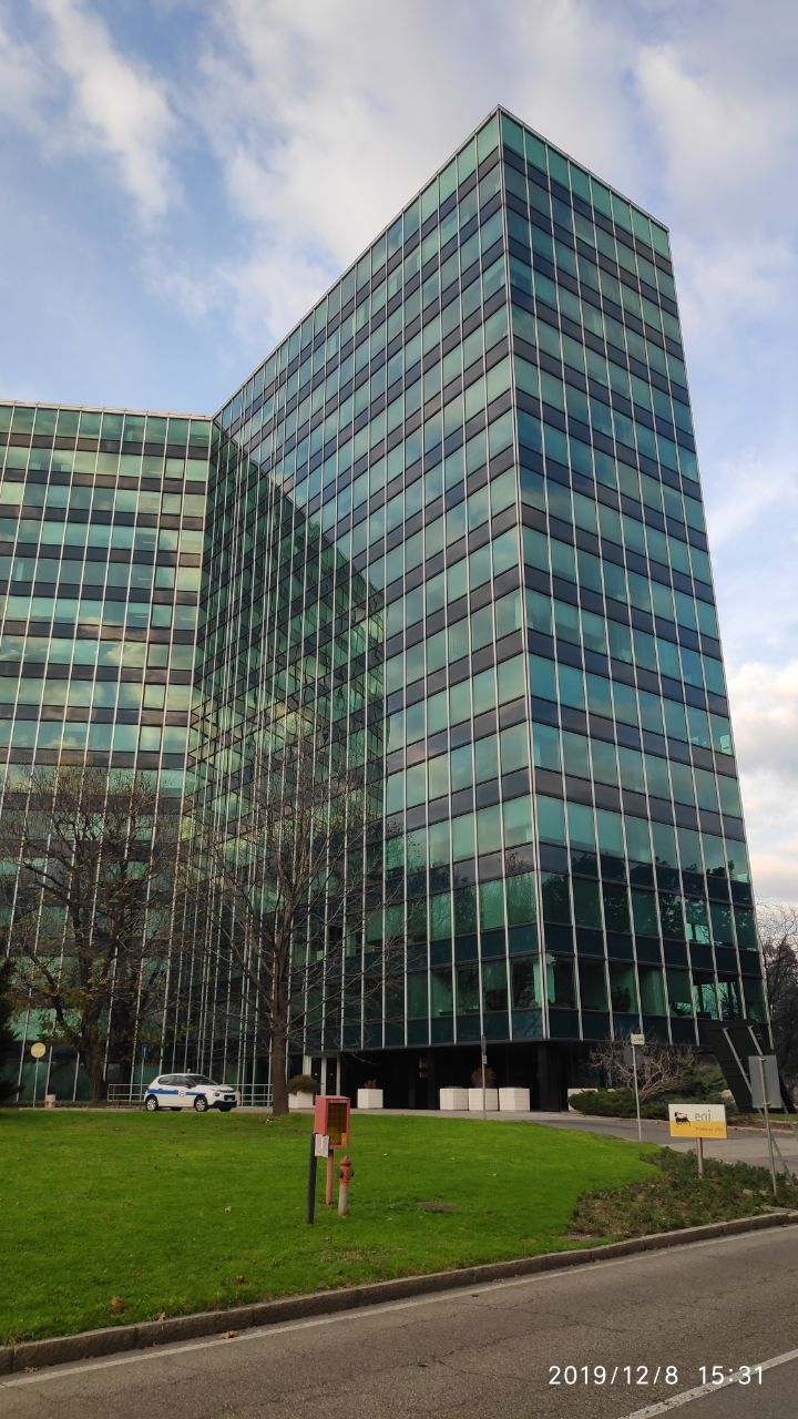 Palazzo di ENI Versalis (San Donato Milanese dicembre 2019)